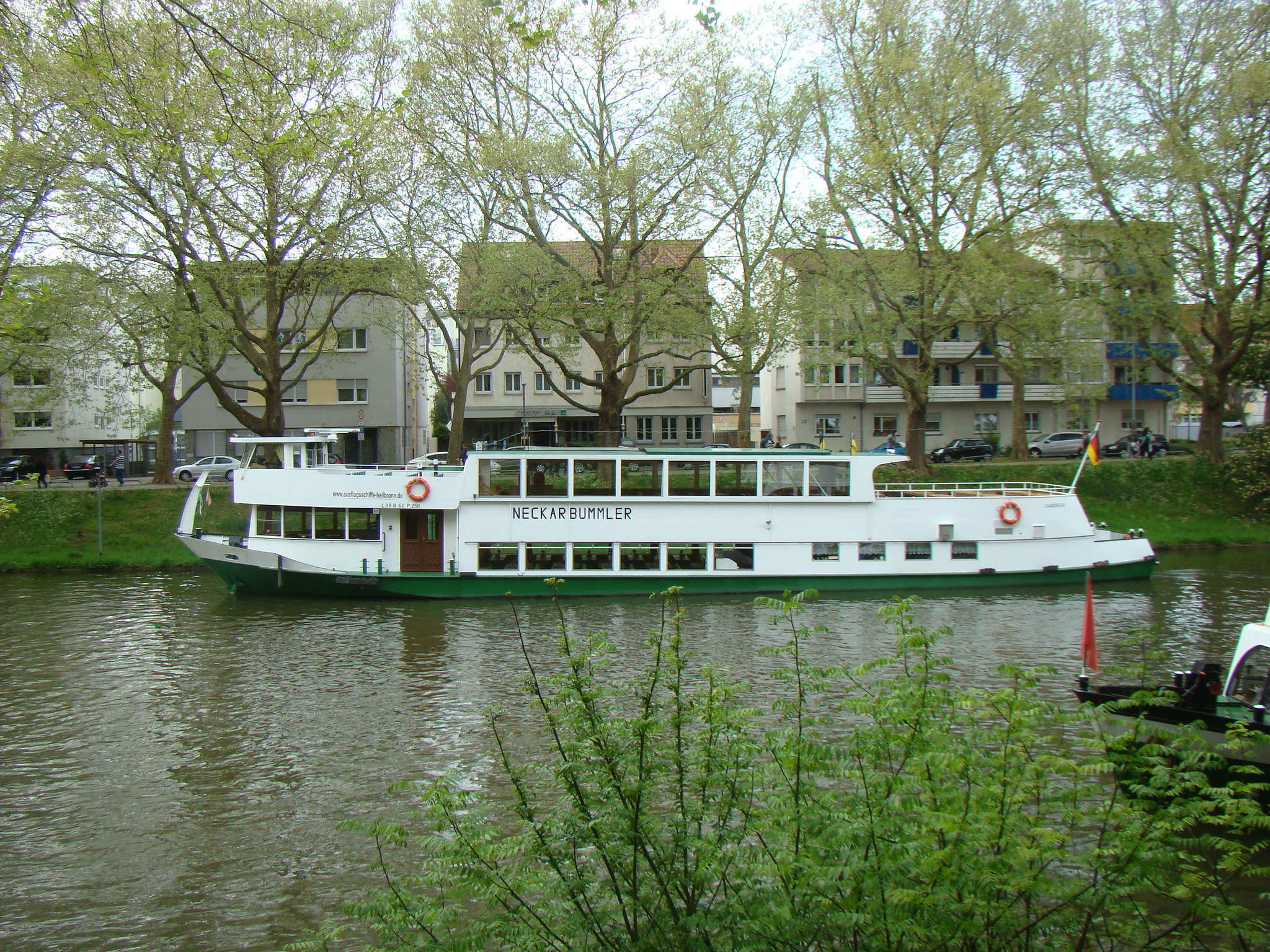 Heilbronn, Neckarbummler (gebaut 1975 in der Neckarwerft Neckarsulm)